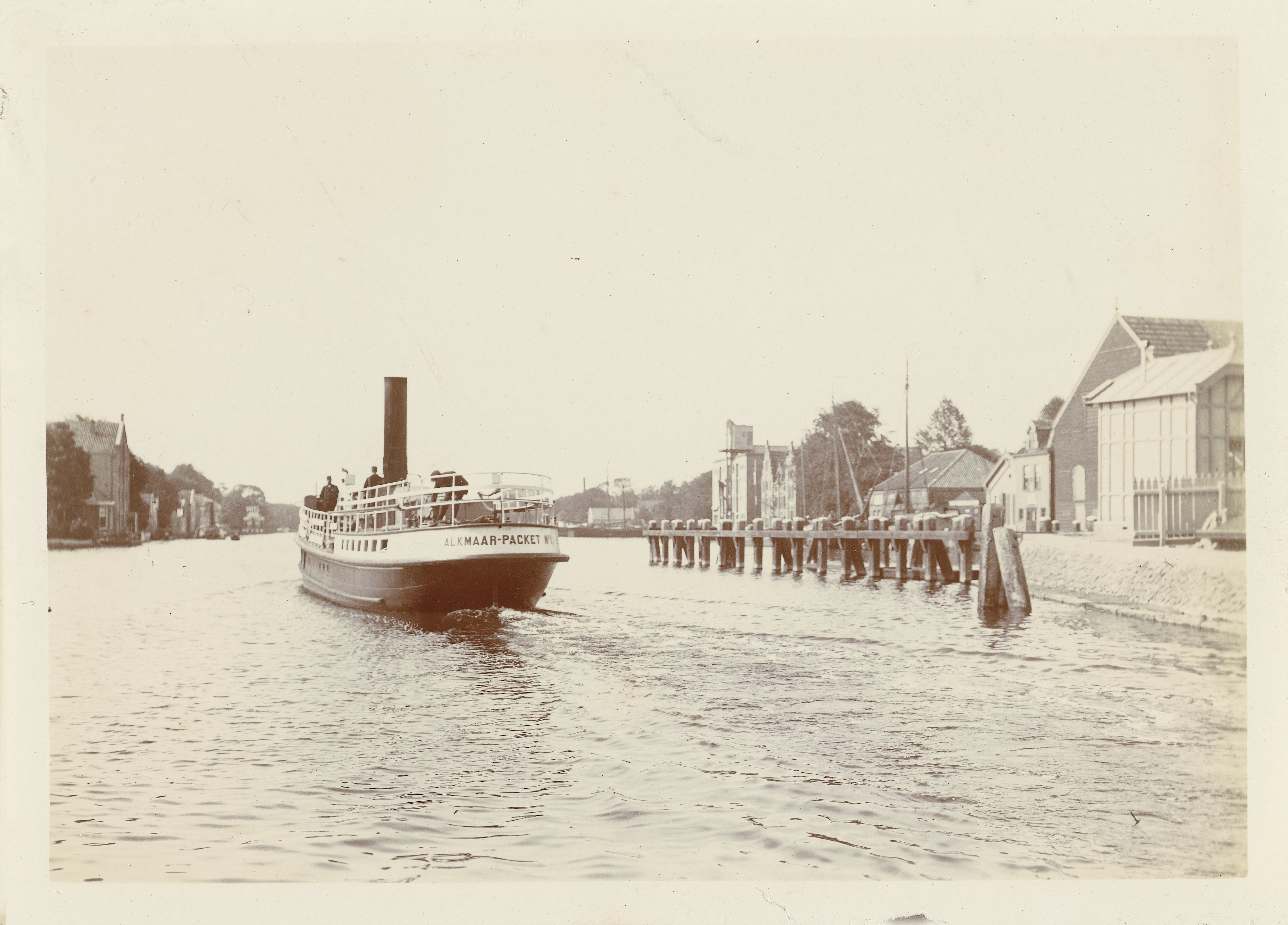 Het stoomschip "Alkmaar Packet 1" in Zaandam op de Zaan kanaal